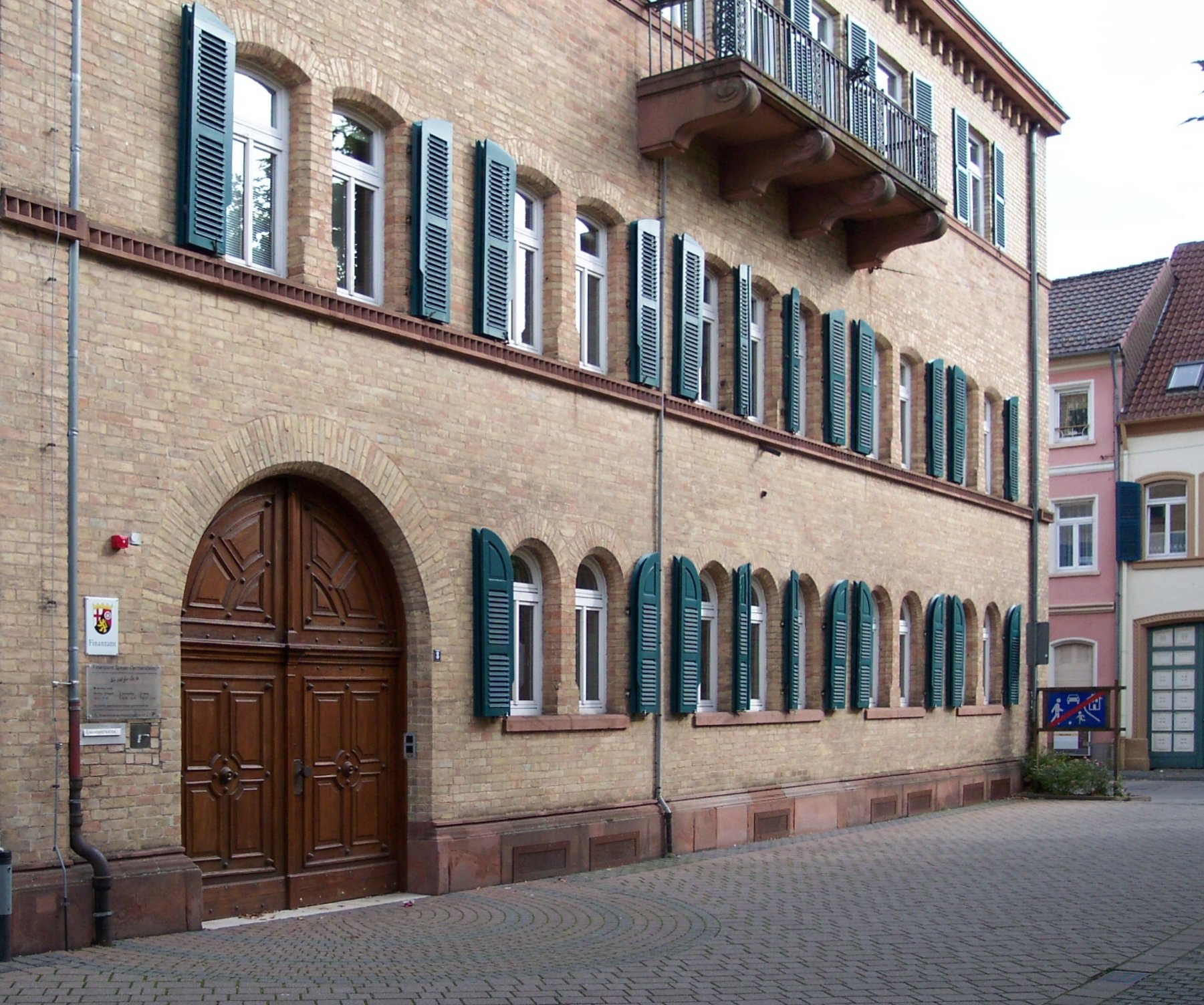 Gebäude des Finanzamts. Ehemaliges Gebäude der Lateinschule, heute Finanzamt. Und das erste als zweites ;) Luxo. Entzerrt. Germersheim, Königsplatz 8: Finanzamt, ehemaliges Bezirksamt.